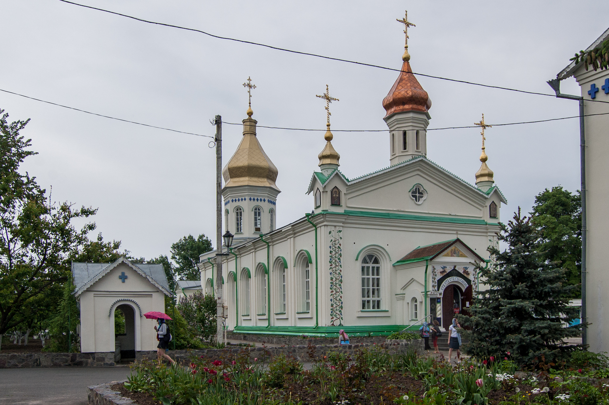 Трапезна церква, Полтава, Вул. Фрунзе / Свердлова, 3